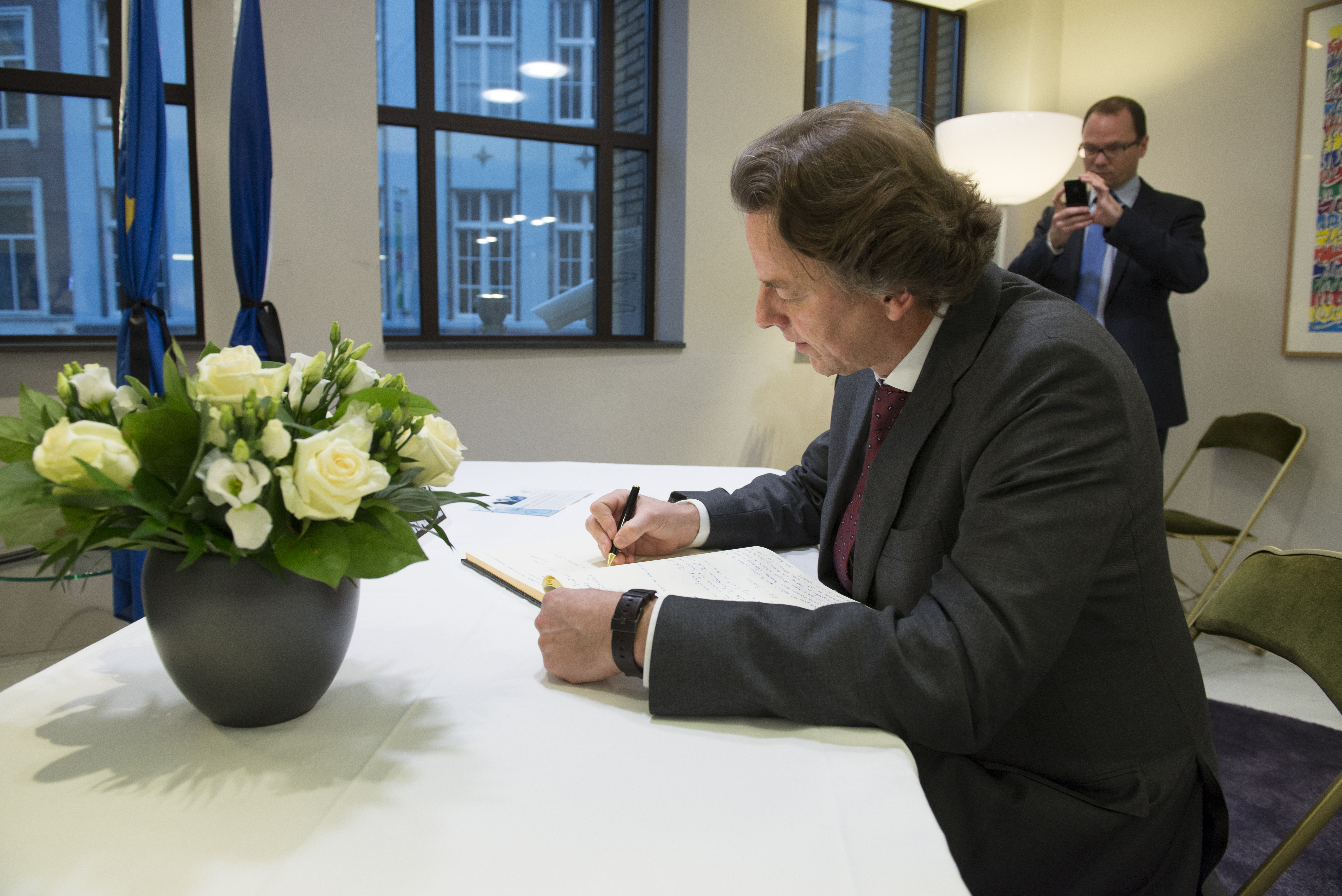 Koenders tekent condoleanceregister op Franse ambassade Minister Koenders (Buitenlandse Zaken) heeft donderdag op de Franse ambassade in Den Haag het condoleanceregister getekend voor de slachtoffers van de aanslag in Parijs. ‘Deze verschrikkelijke terreurdaad heeft de wereld geschokt’, aldus minister Koenders. ‘Tegelijkertijd maakt de wereldwijde eenheid en verbroedering van mensen van alle gezindten en overtuigingen duidelijk dat de wereld dit soort intolerante acties van extremisten niet verdraagt’, aldus Koenders. ‘We moeten er alles aan doen om onze waarden te beschermen: de pen moet altijd sterker blijven dan het zwaard. Solidariteit en eenheid zijn de kernwoorden.’ Koenders zal donderdagavond om 18.00 uur ook aanwezig zijn bij de demonstratie op De Dam, als steunbetuiging aan de slachtoffers en de nabestaanden van de terreuraanslag in Parijs. ‘Door bijeen te komen en te protesteren, laten we zien dat zij niet alleen staan in hun verdriet. We staan solidair zij aan zij en rouwen samen. Niet alleen Charlie Hebdo is getroffen, maar iedereen die gelooft in een open en vrije samenleving. Door te starten bij het Franse consulaat bewijst Nederland in eenheid zijn solidariteit met Frankrijk.’